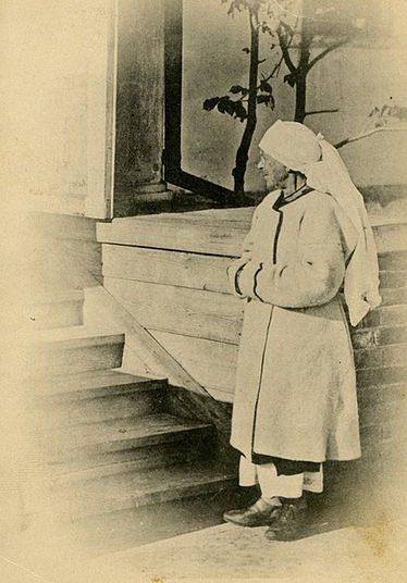 Листівка "Малоросійські типи" Жінка в намітці